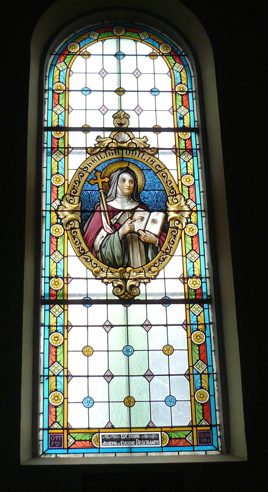 Vitrail de Sainte Odile se trouvant dans l'église de Bassemberg. Don de Joseph et Eugène Deschamps, 1964